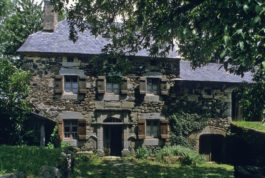 La ferme Allègre dans le village de Loubaresse, Cantal, France. .